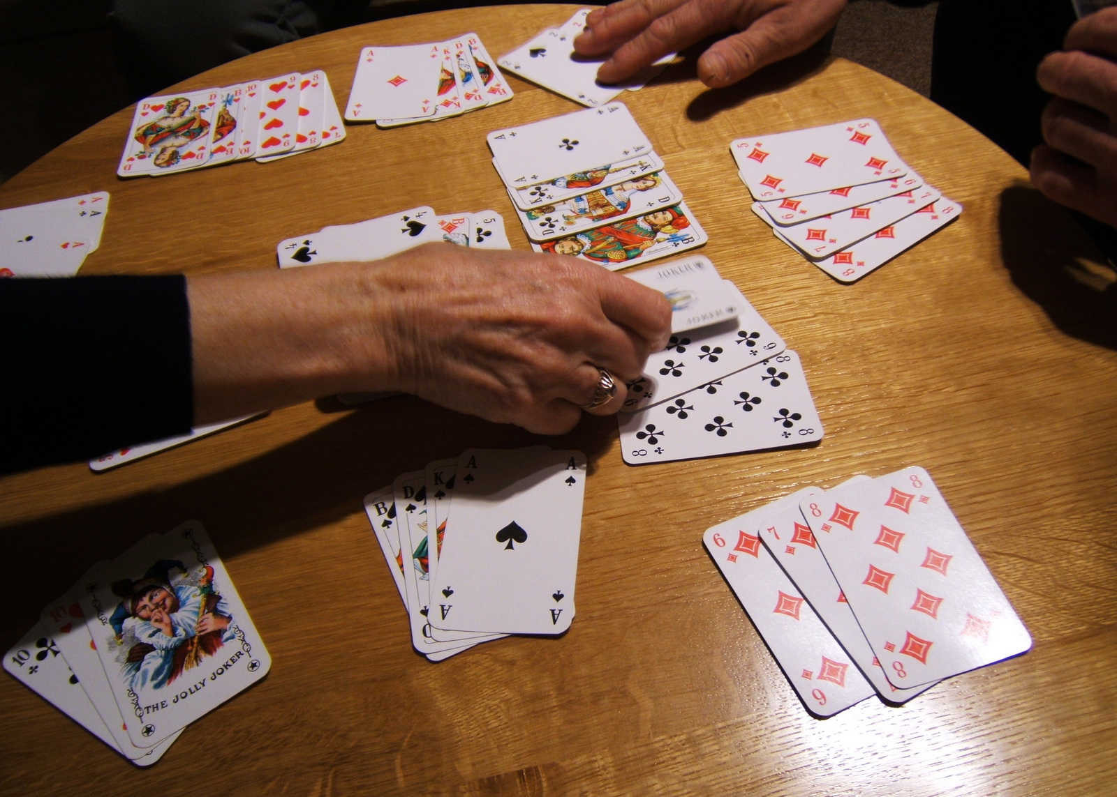 Beim Rommé-Spiel Source: shot by SehLax on 29/12/2005